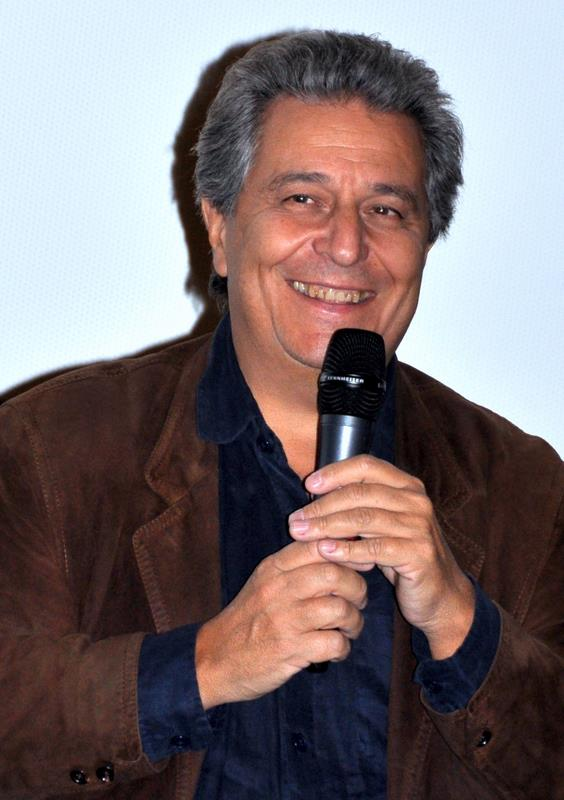 Christian Clavier à l'avant-première de On ne choisit pas sa famille